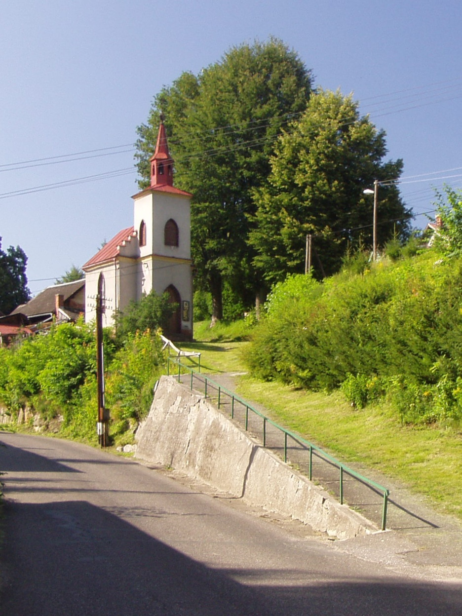 Kobyly - kaple svatého Václava